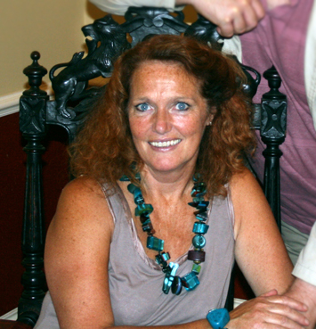 Louise Jameson